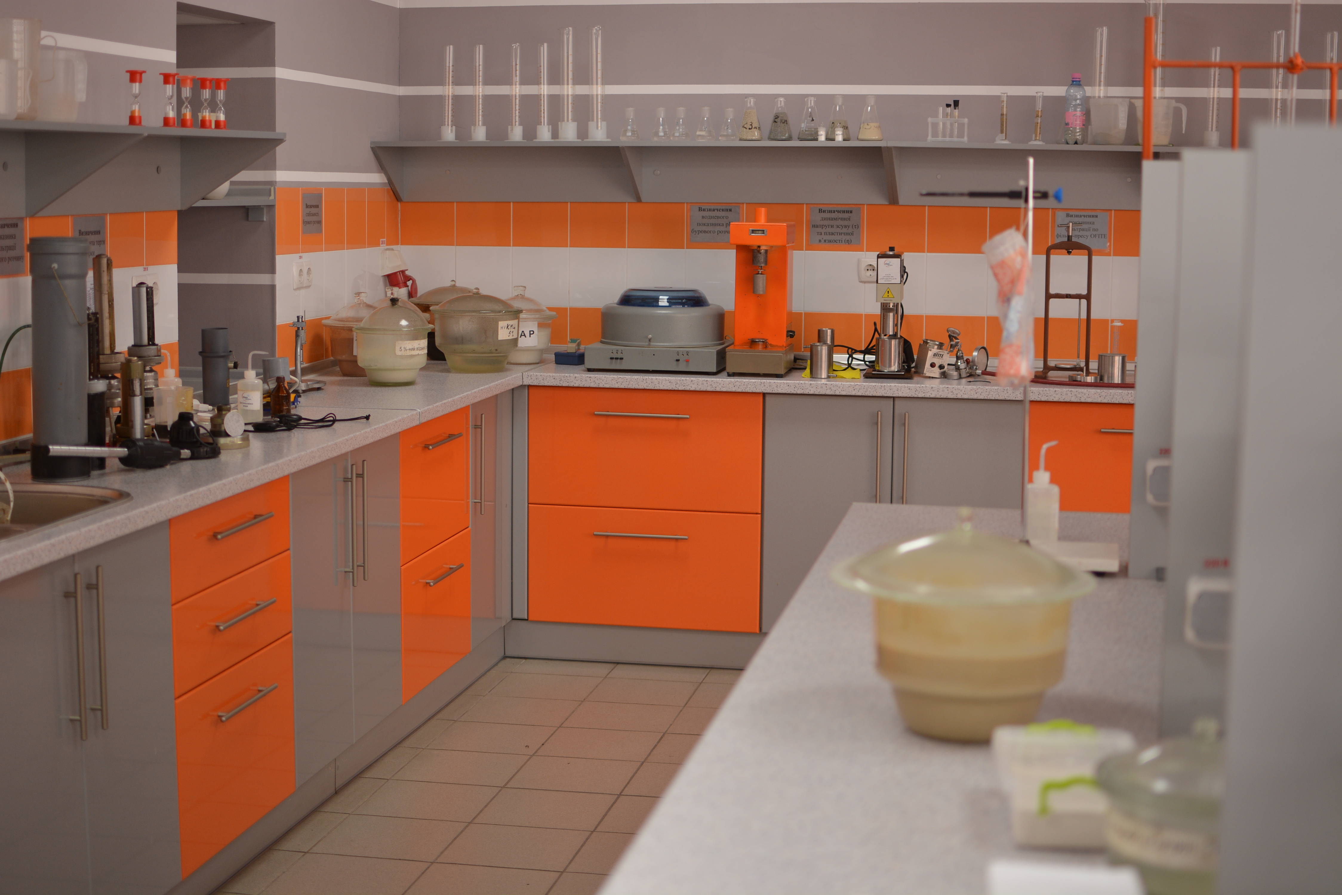 Міжнародне наукове співробітництво